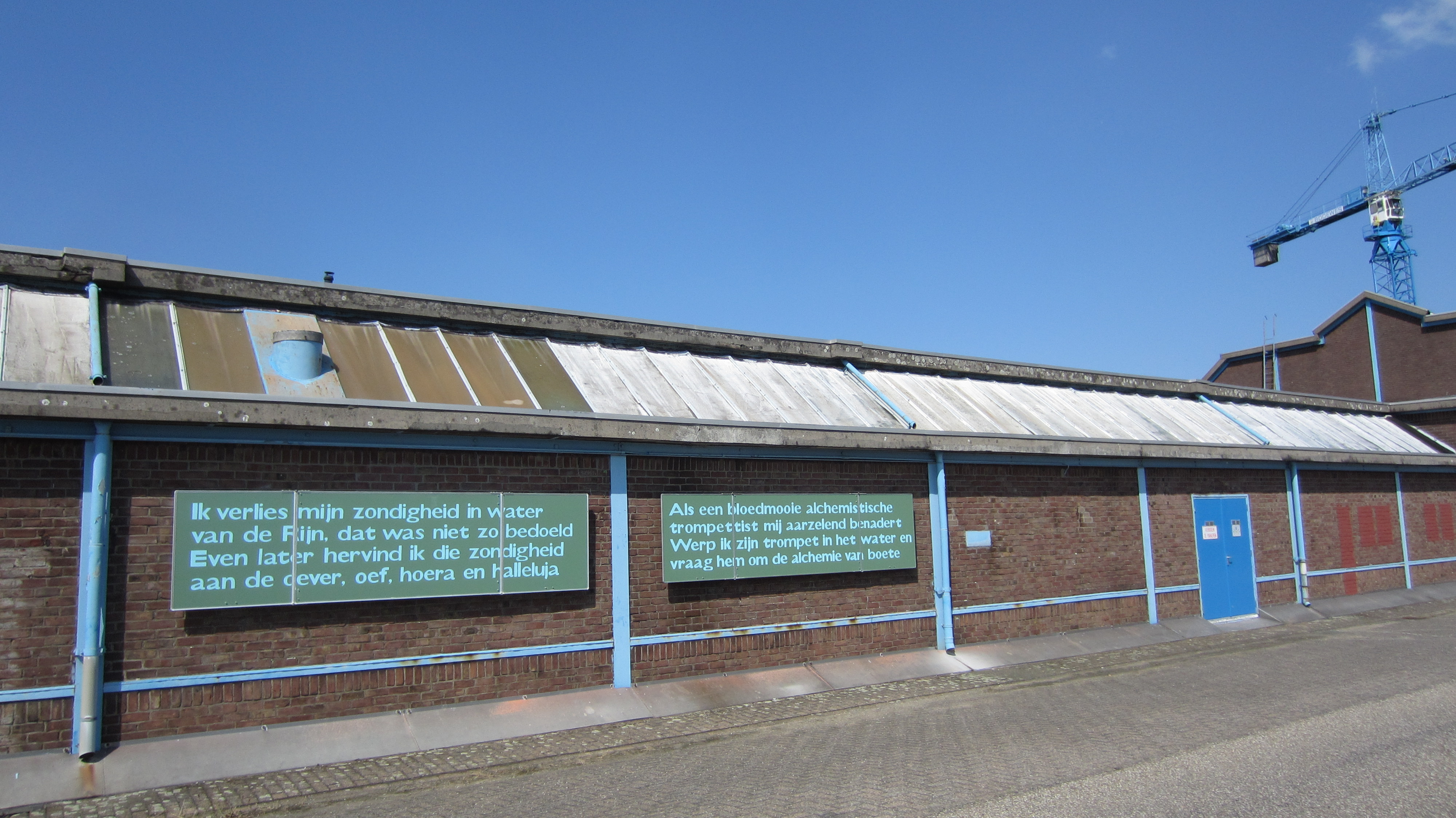 Gedicht van Delphine Lecompte in Millingen aan de Rijn, tijdens de poëzieroute Rivieren langs de verzen (2014).